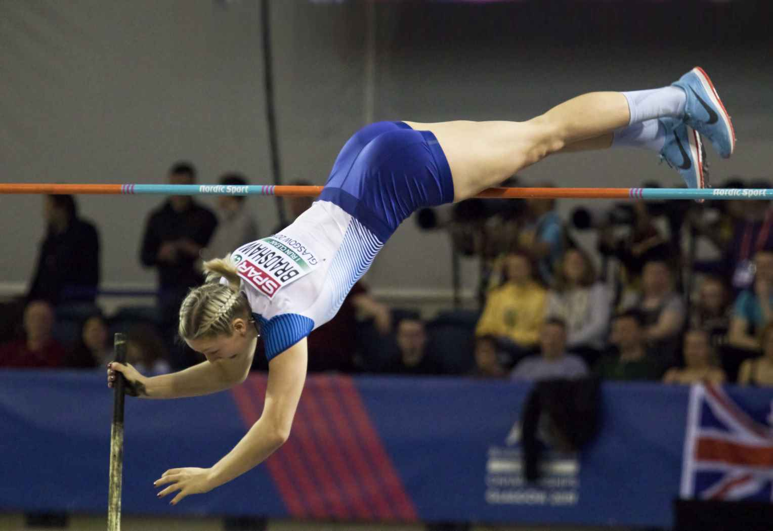 EKI30253 finale polsstok bradshaw